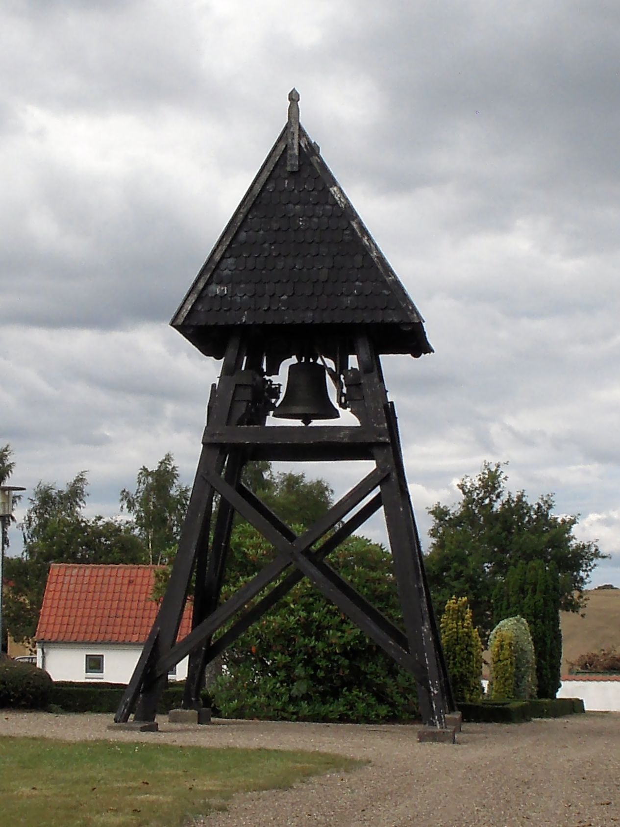 Morild Kirke i Vendsyssel. Klokkestablen. August 2013.